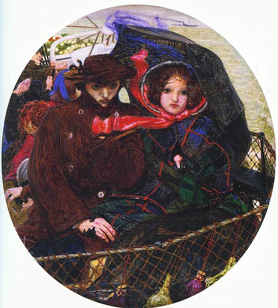 Studie zu dem gleichnamigen Gemälde, 1852/55